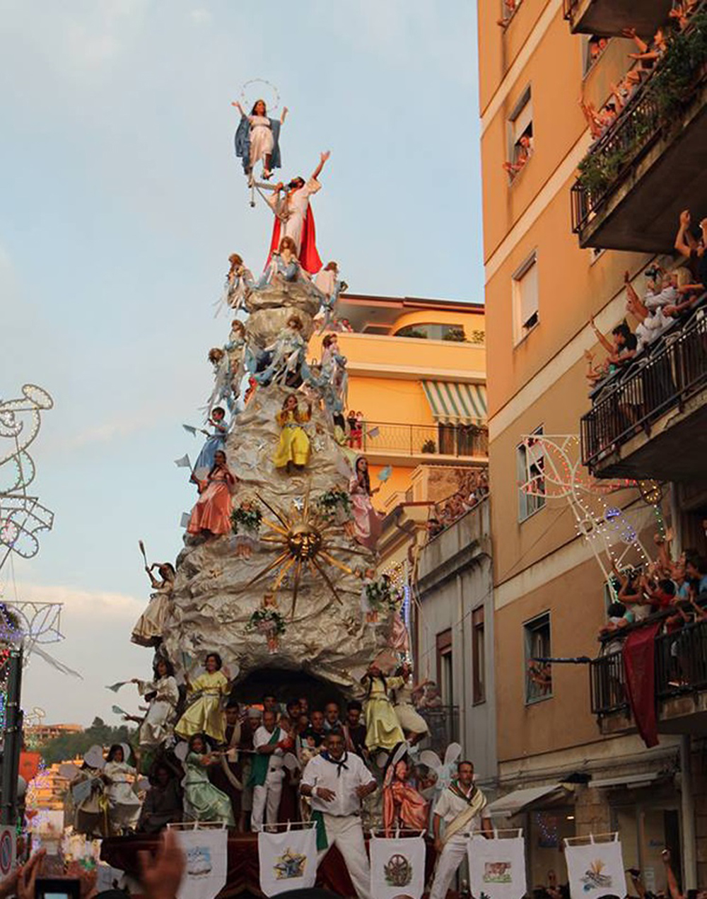 La Varia di Palmi 2013 durante il trasporto lungo il corso Giuseppe Garibaldi